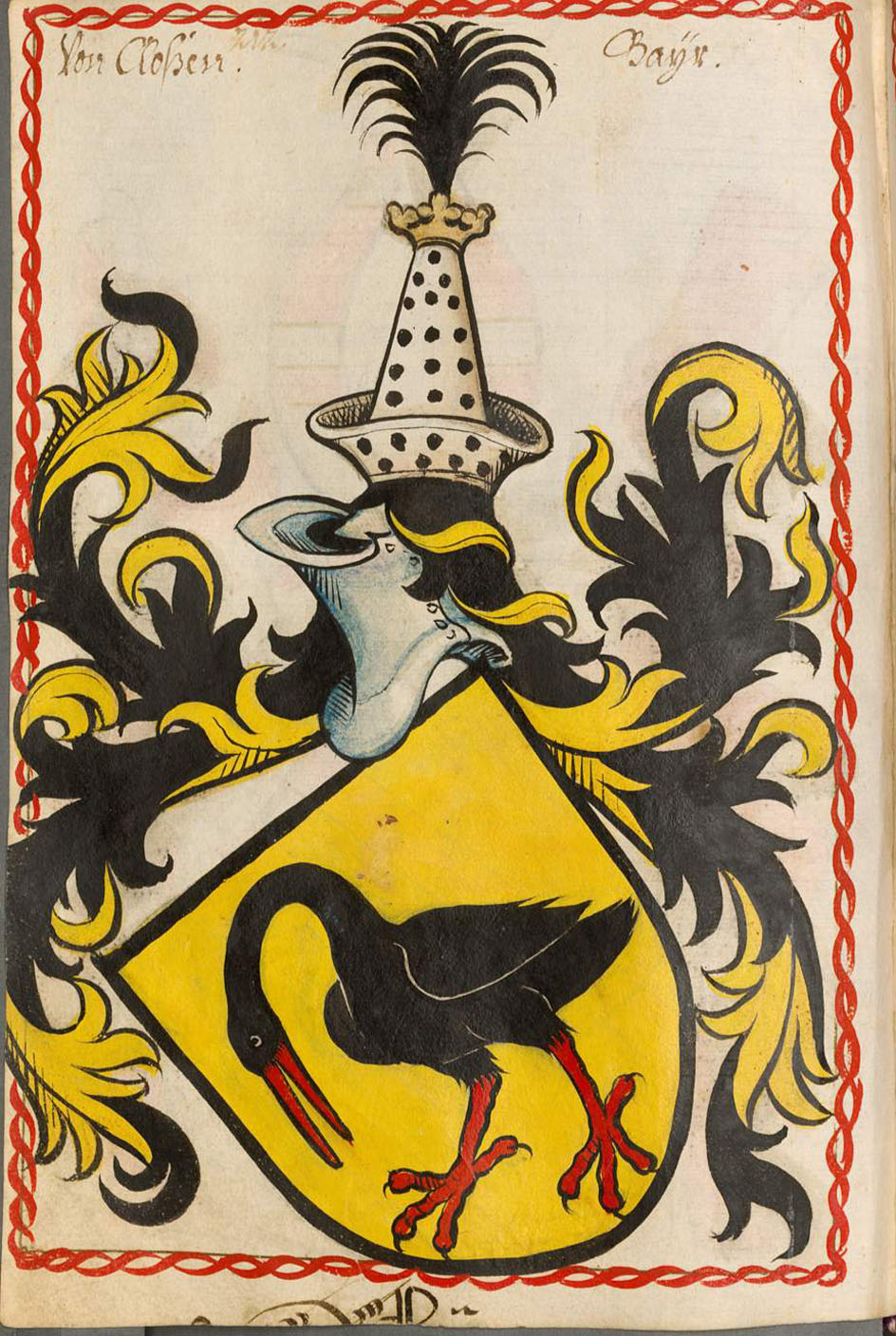 Scheibler'sches Wappenbuch , älterer Teil; Seite 212 Von Cloßen Bayr Wappen der Closen zu Gern (Niederbayern)